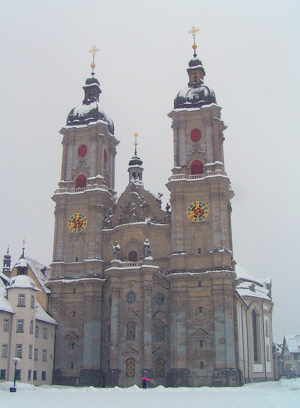 Stiftskirche in St.Gallen (Dom respektive Kathedrale)